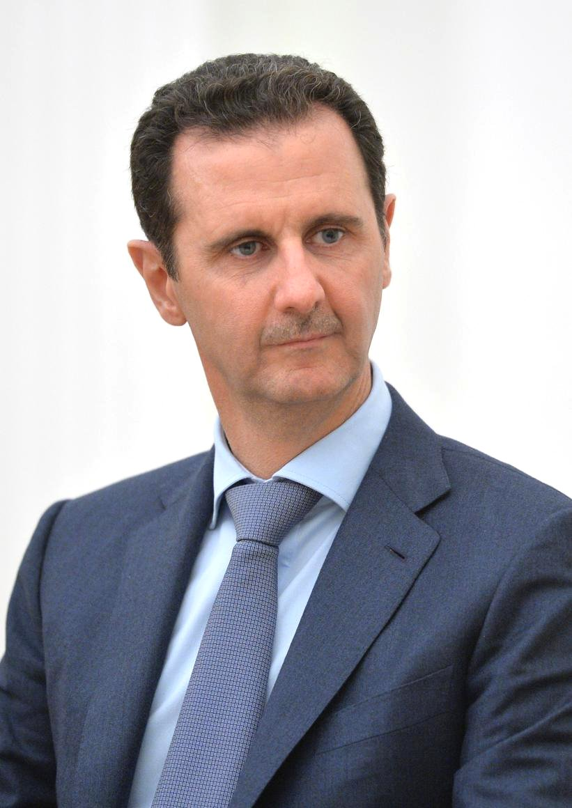 Президент Сирии Башар Асад во время встречи с Президентом России Владимиром Путиным